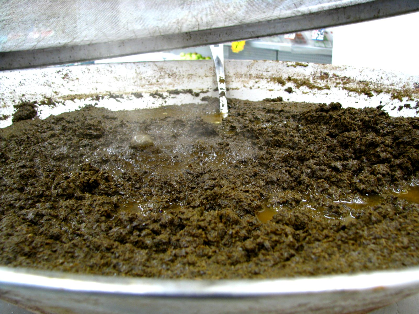 A maniçoba, um prato da culinária baiana e paraense.